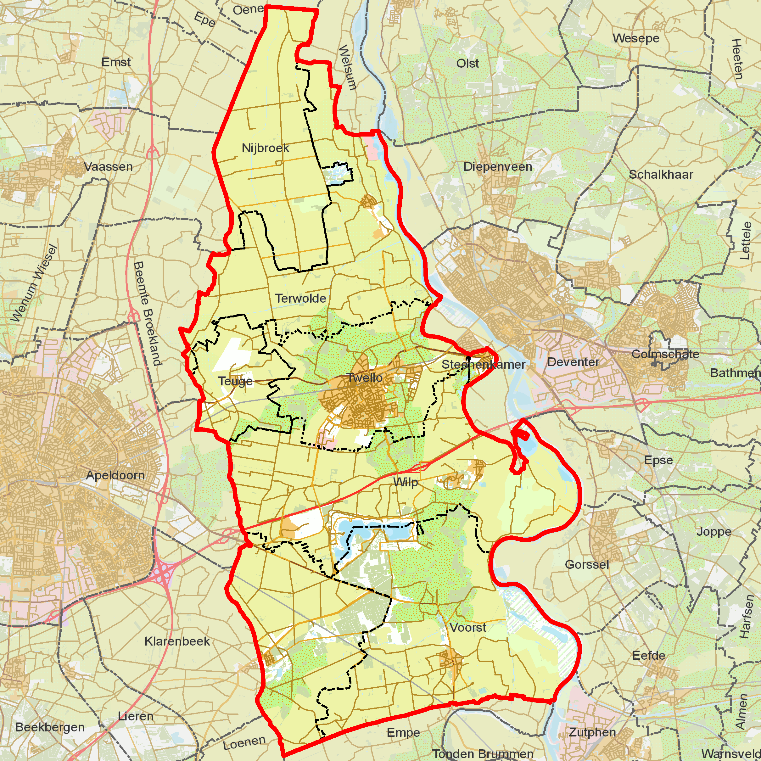 BAG woonplaatsen - Gemeente Voorst.png